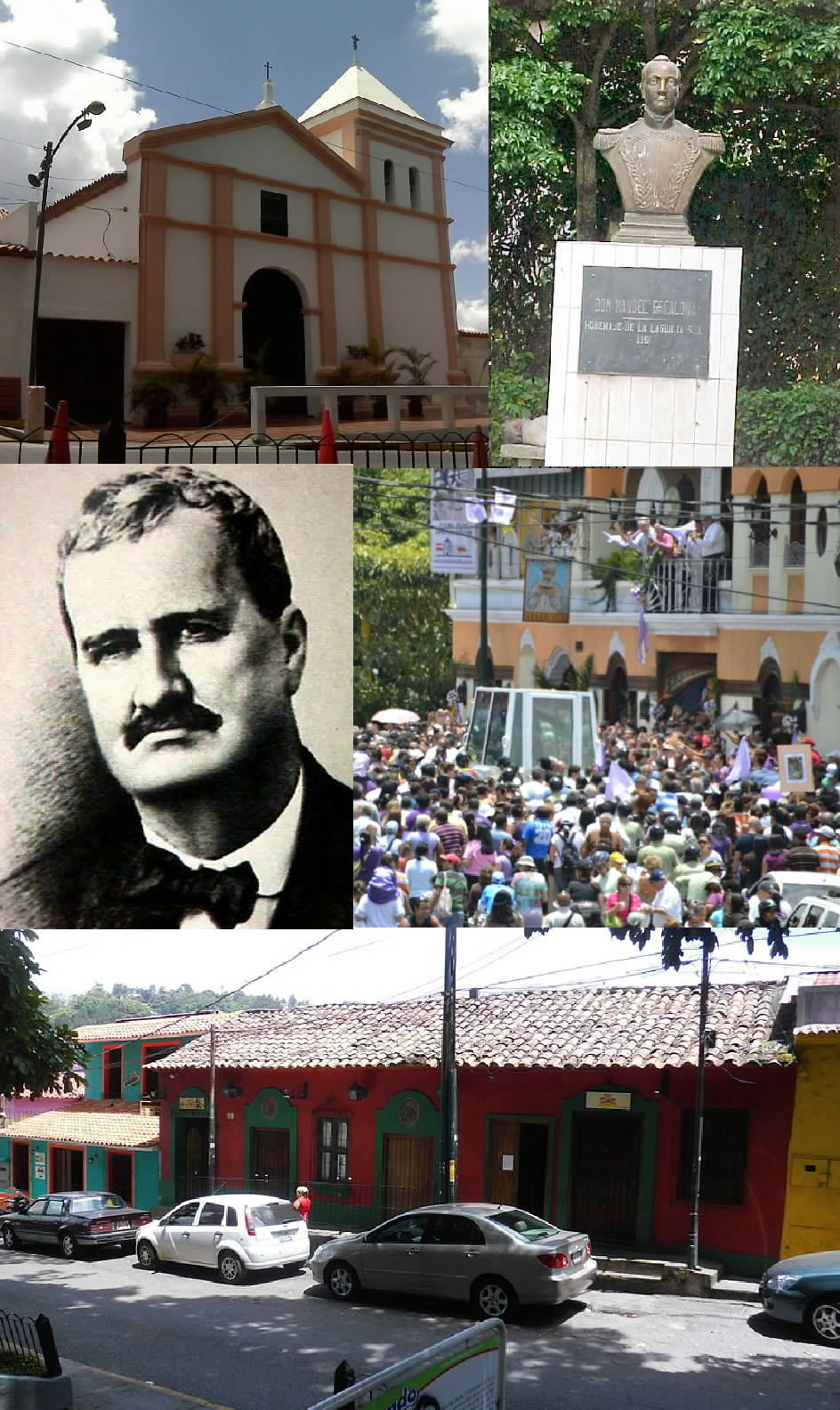 Imágenes Históricas de El Hatillo: Iglesia de Santa Rosalia Busto de Juan Manuel Escalona Ingeniero Ricardo Zuloaga Procesión del Nazareno de San Pablo en el Hatillo Casa de Baltazar de León